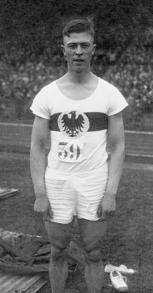 France-Allemagne : Dobermann (allemand) saut en longueur 1er : [photographie de presse] / Agence Meurisse